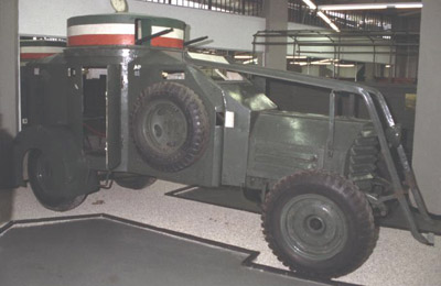 Autoblinda Ansaldo Lancia 1ZM con torretta singola, esposta presso il Museo storico della motorizzazione militare di Roma-Cecchignola